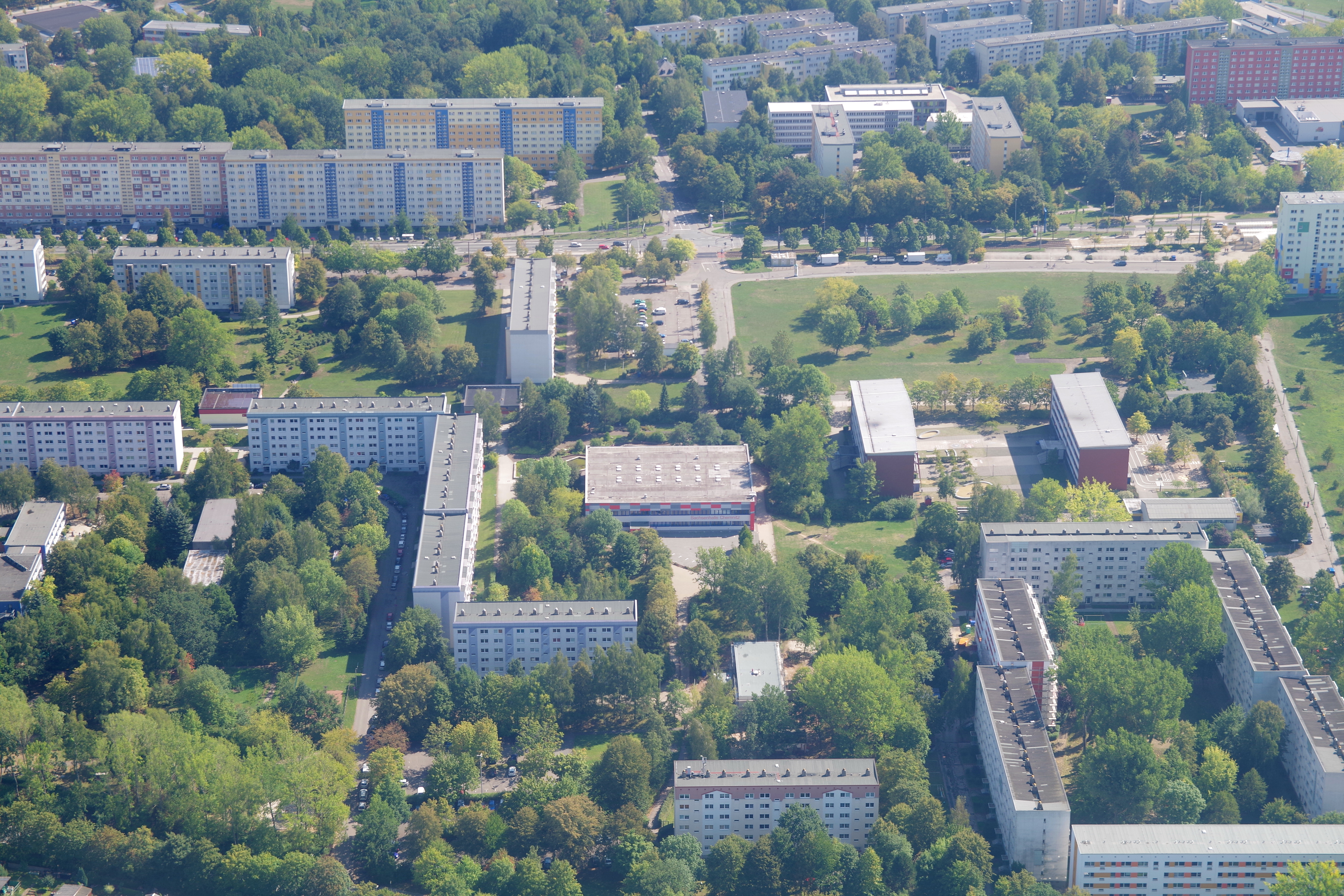 Wohngebiet Fritz Heckert - Baugebiet II, in der Bildmitte die Sachsenhalle